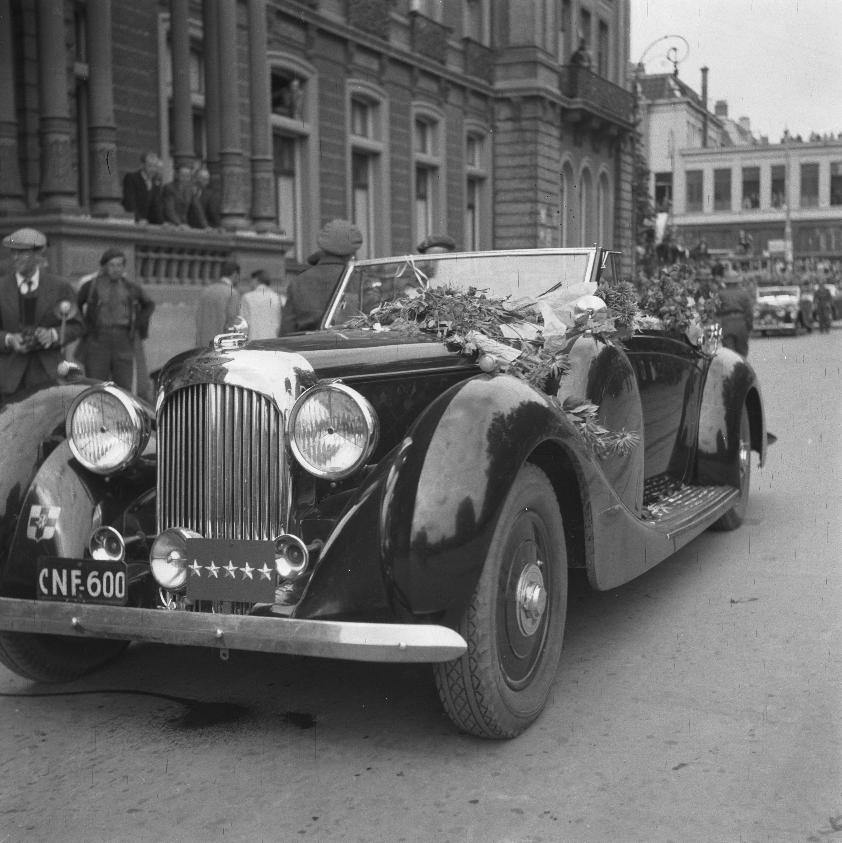 Collectie / Archief : Fotocollectie Anefo Reportage / Serie : Bezoek van veldmaarschalk Montgomery aan Amsterdam (1945) Beschrijving : Bezoek van veldmaarschalk Montgomery aan Amsterdam. Aankomst per auto bij het Amstelhotel Datum : 1 september 1945 Locatie : Amsterdam, Noord-Holland Trefwoorden : auto's, hotels, militairen, officieren, tweede wereldoorlog Persoonsnaam : Montgomery, B.L., Montgomery, Bernard Fotograaf : Fotograaf Onbekend / Anefo Auteursrechthebbende : Nationaal Archief Materiaalsoort : Negatief (zwart/wit) Nummer archiefinventaris : bekijk toegang 2.24.01.03 Bestanddeelnummer : 900-6878